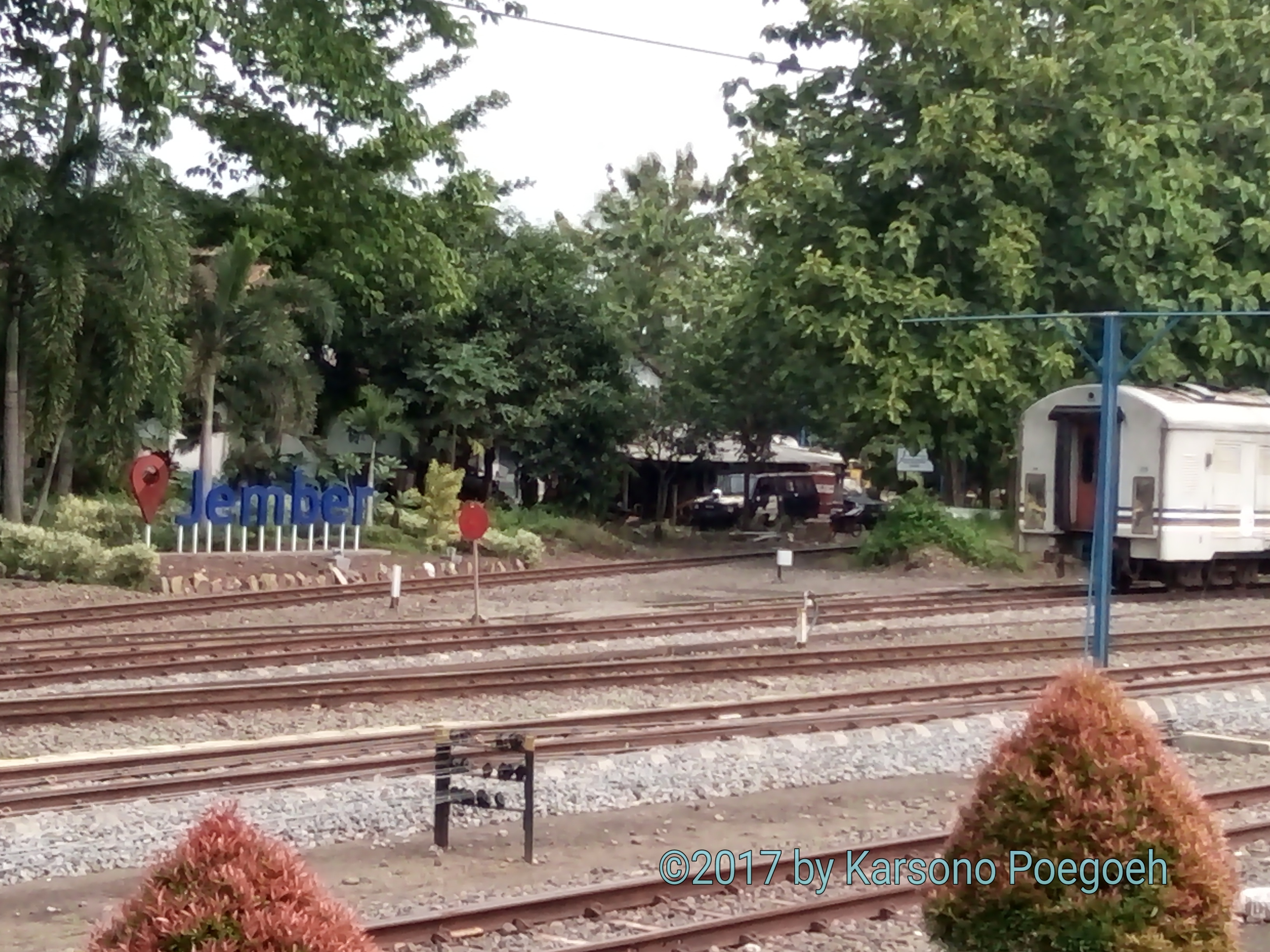 Penanda lokasi Stasiun Jember, di dekat jalur menuju dipo lokomotif (Sumber:karya sendiri).